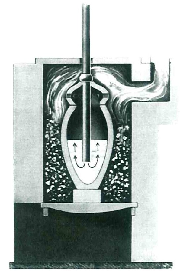 Versuchsbirne von Bessemer von 1856